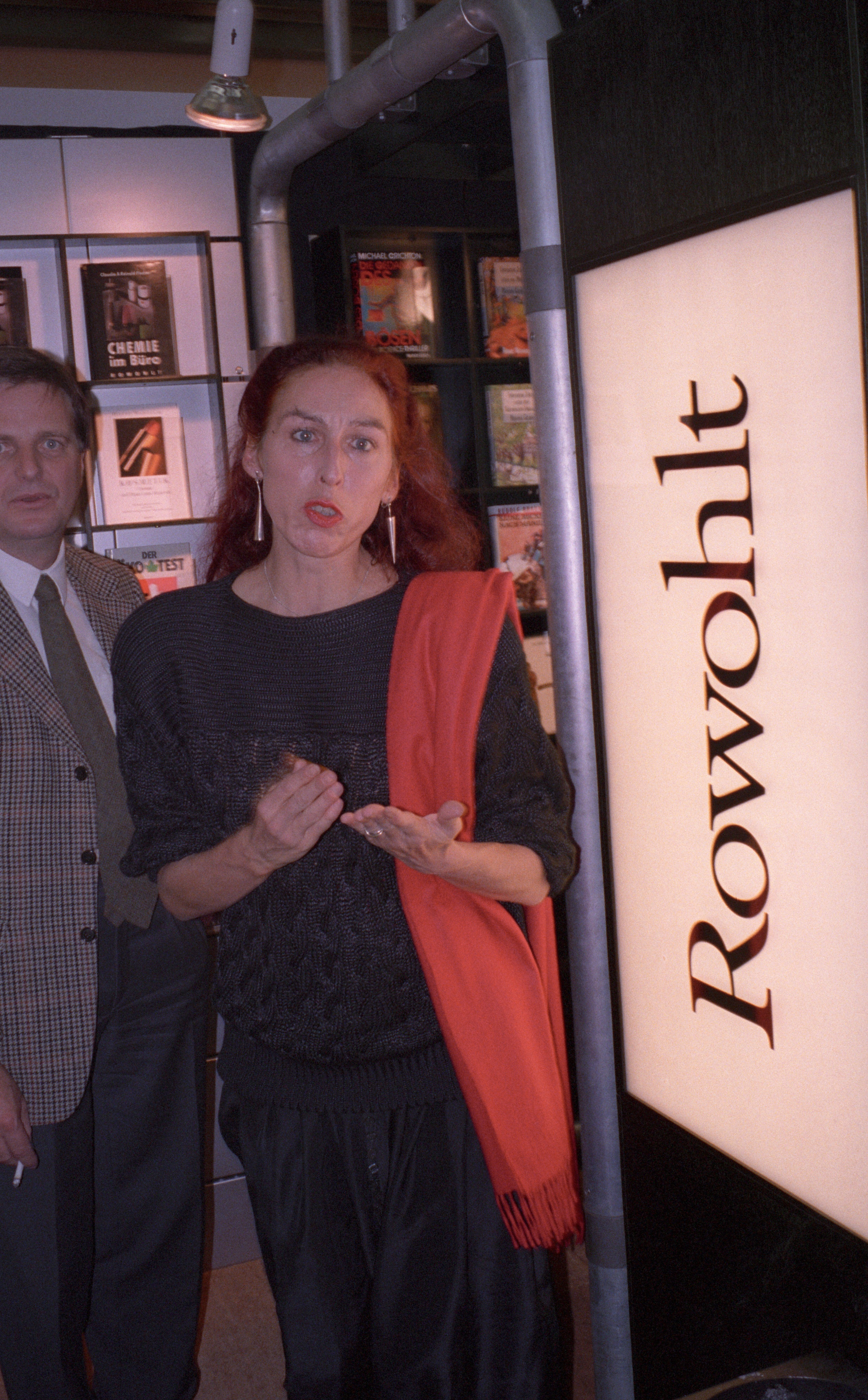 Rowohlt-Stand